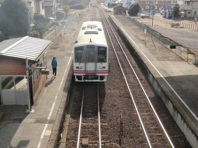 関東鉄道常総線 太田郷駅 2012年1月